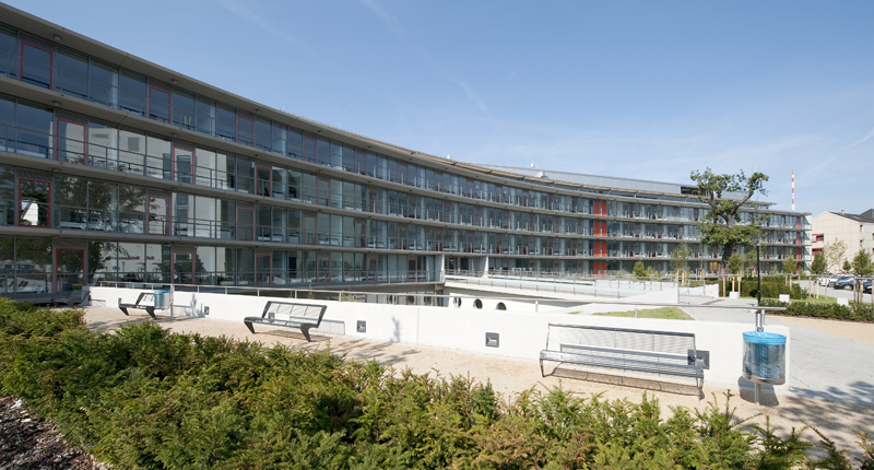 Universitätsklinikum Bonn, Biomedizinisches Zentrum